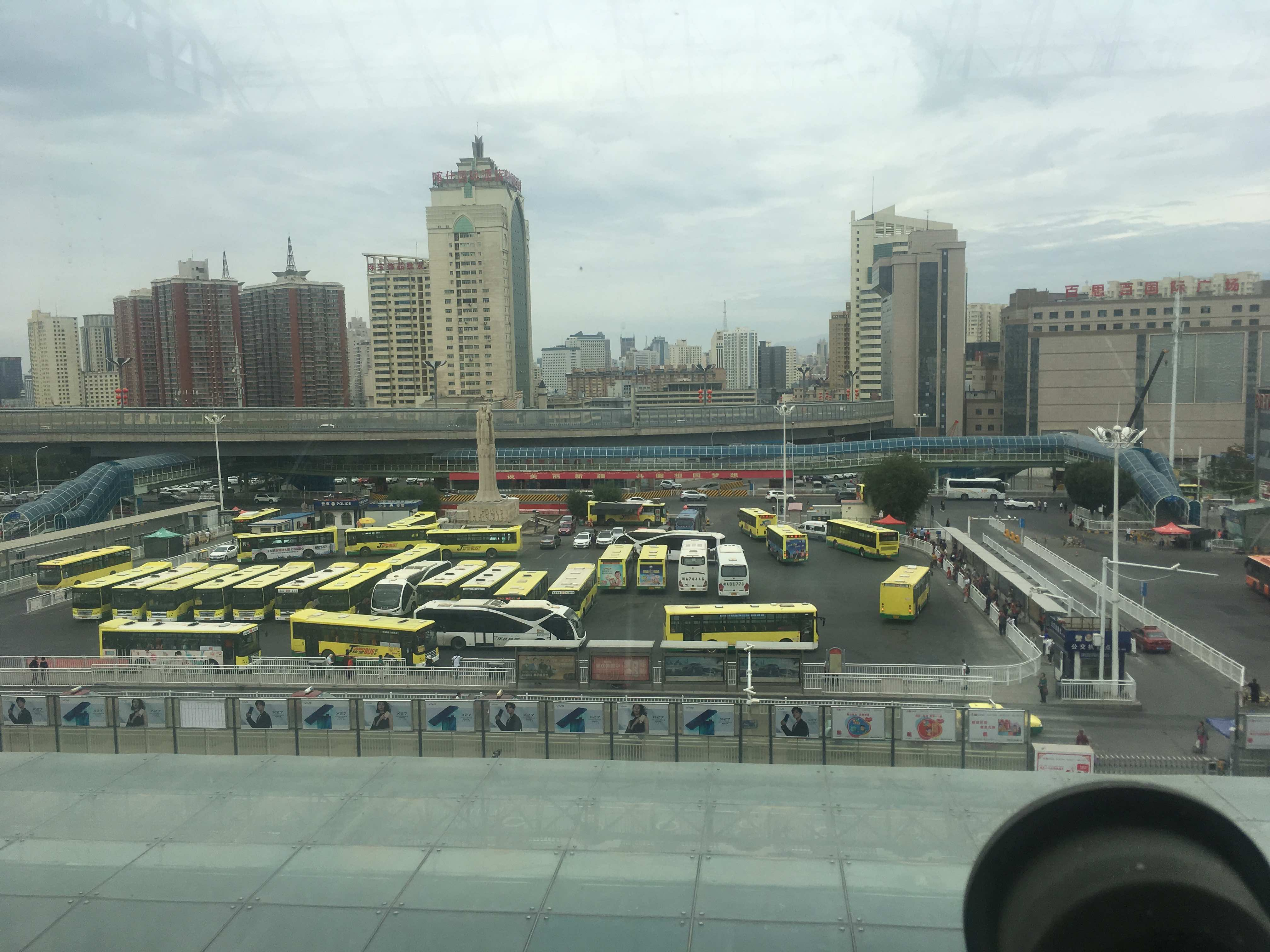 乌鲁木齐南站站前广场